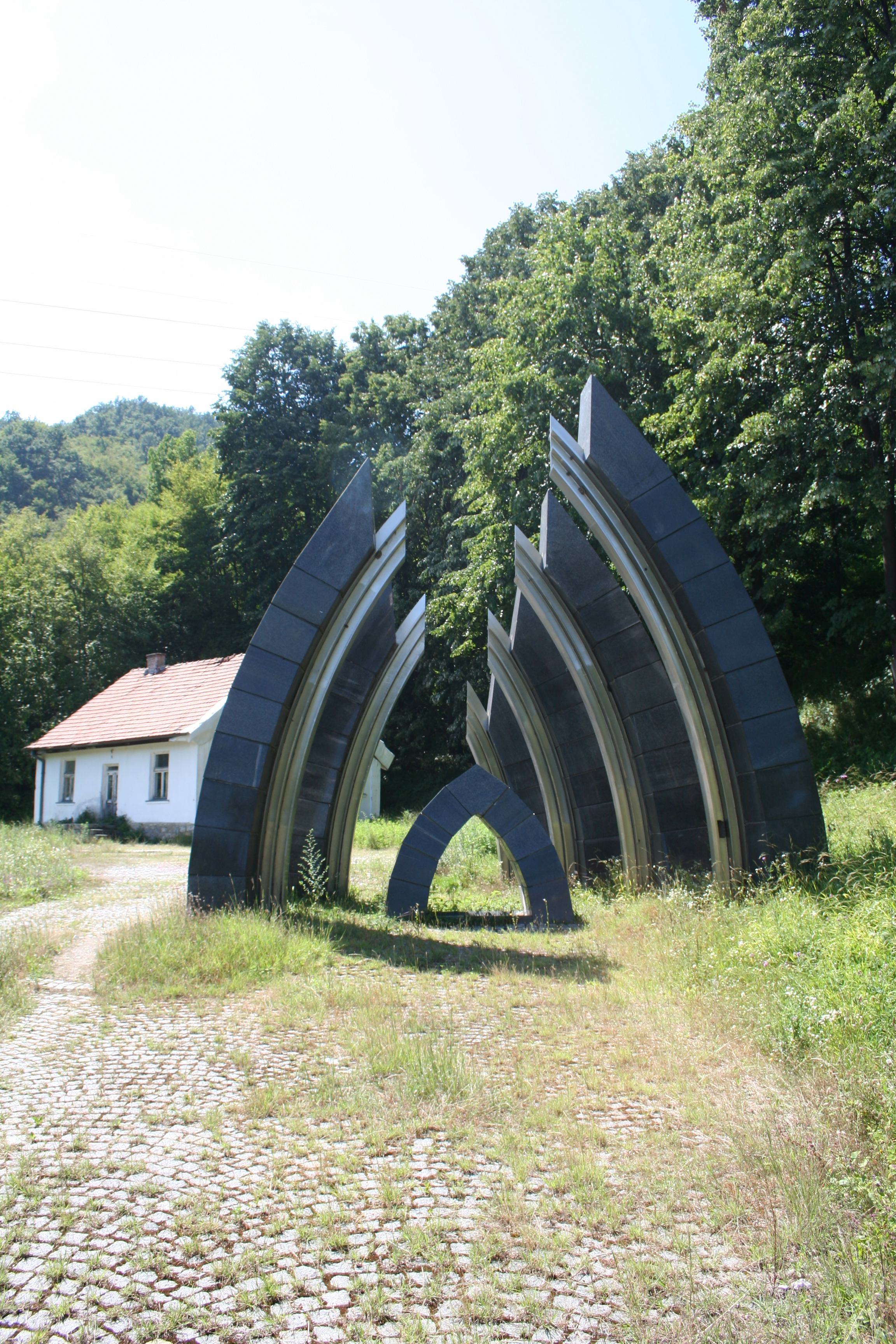 Znamenito mesto Stolice kod Krupnja